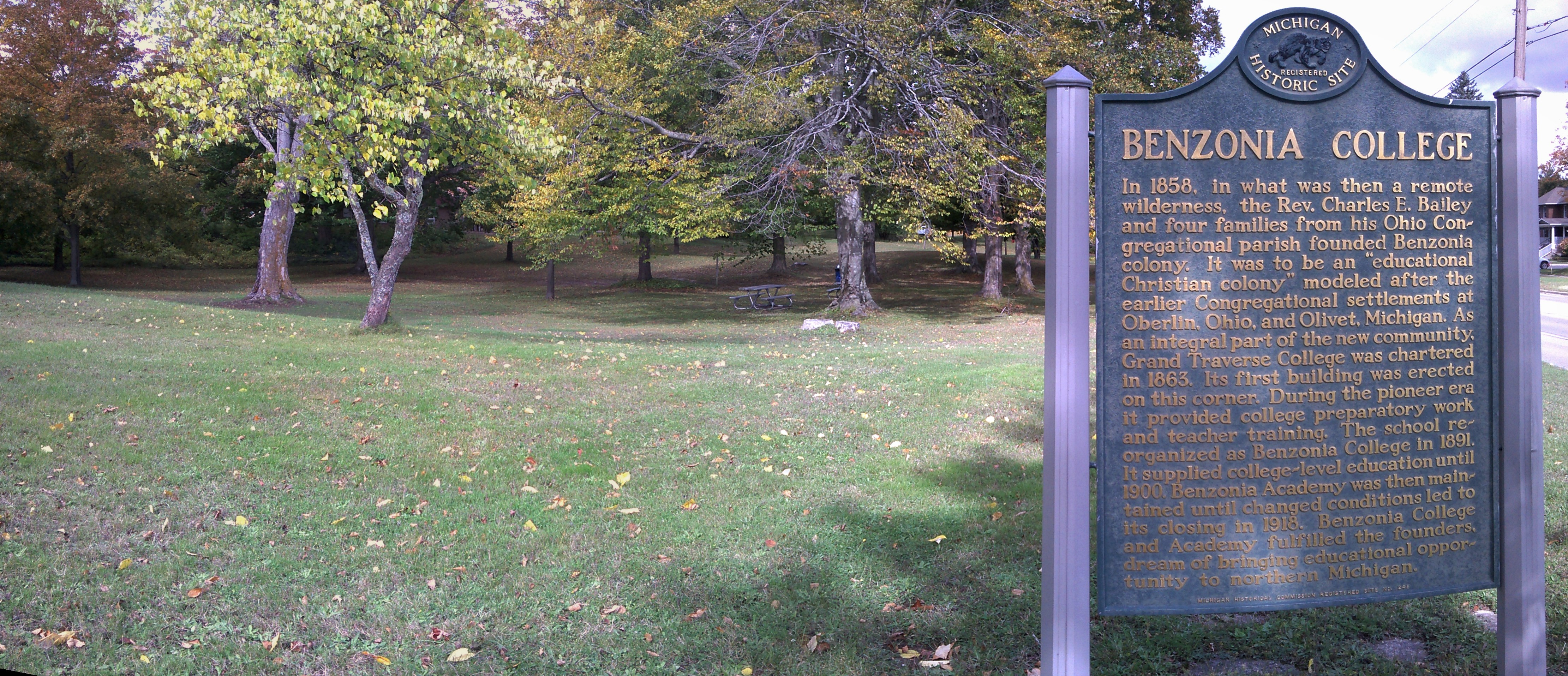 Benzonia College Historical Marker